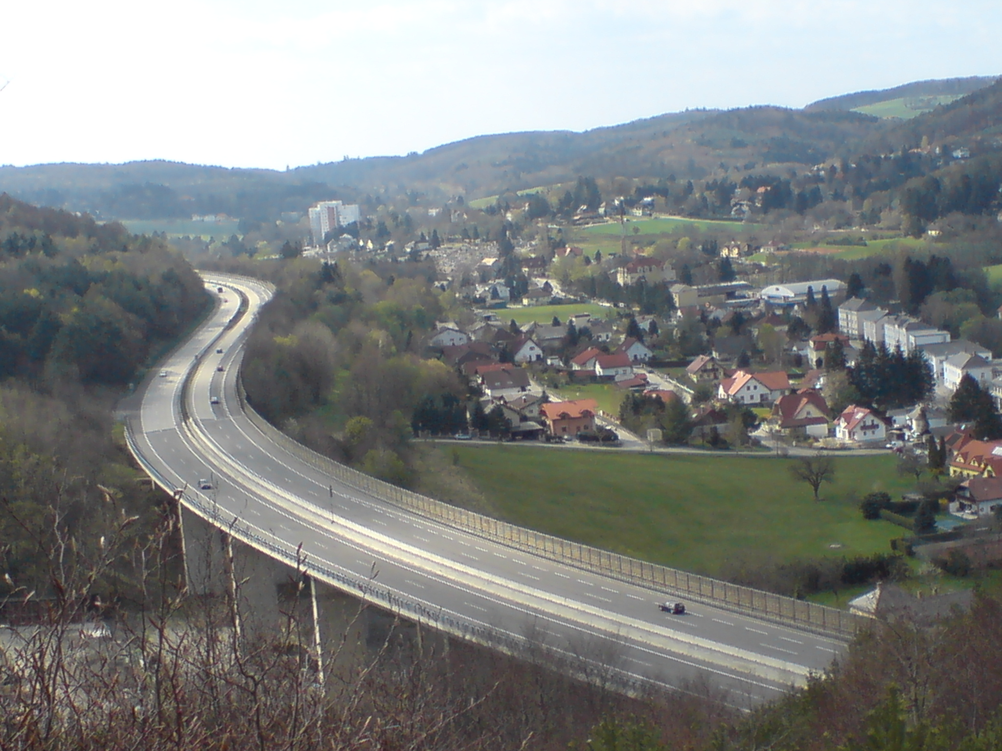 Pressbaum gegen Westen. Jede Zeit hinterlässt ihre Spuren in der Landschaft, die prägnantesten sind nicht immer die schönsten